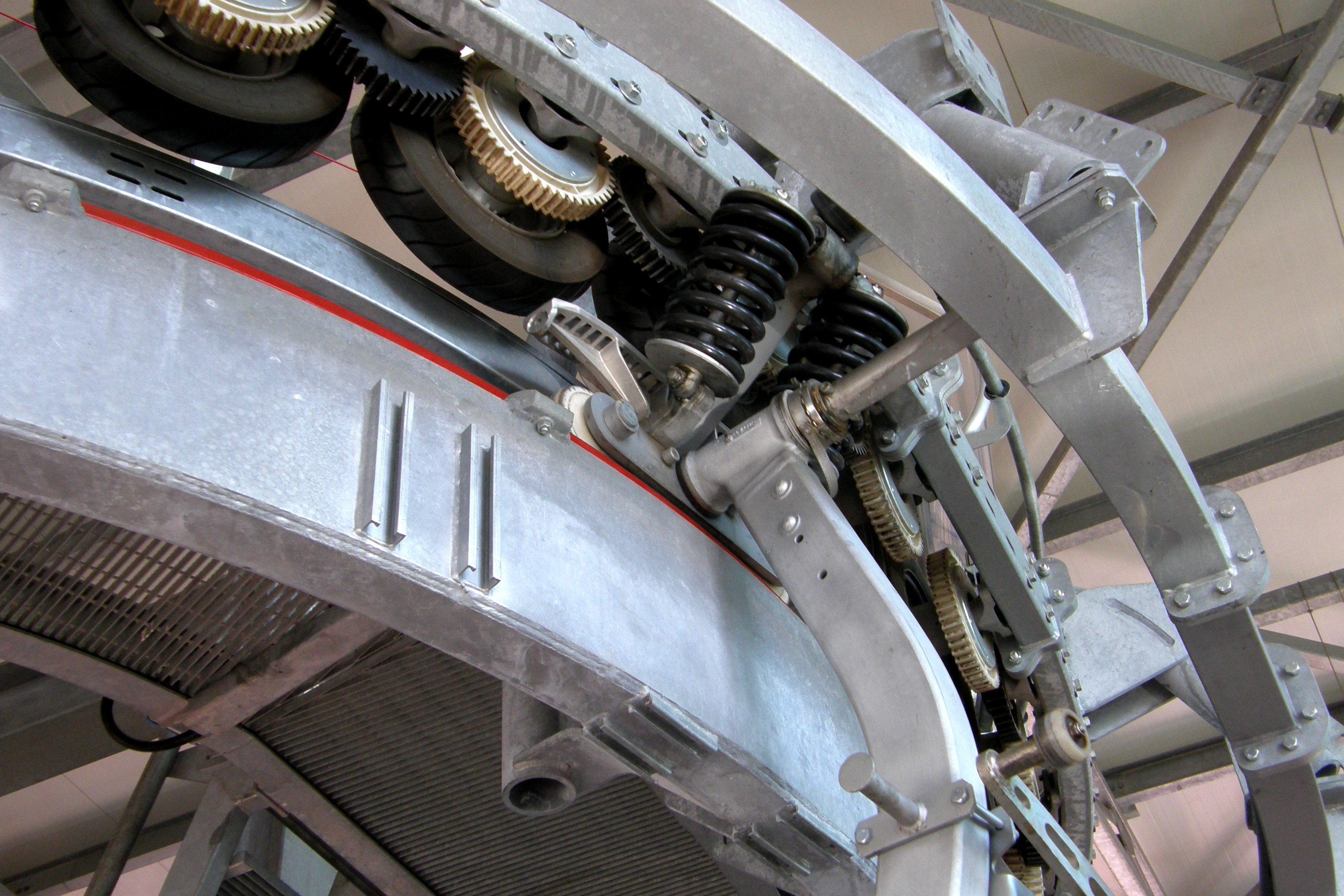 Mécanisme du téléphérique reliant Bergama au site de Pergame, province d'Izmir région Égéenne, Turquie.